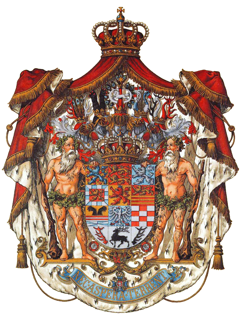 Wappen Deutsches Reich - Herzogtum Braunschweig (Grosses)